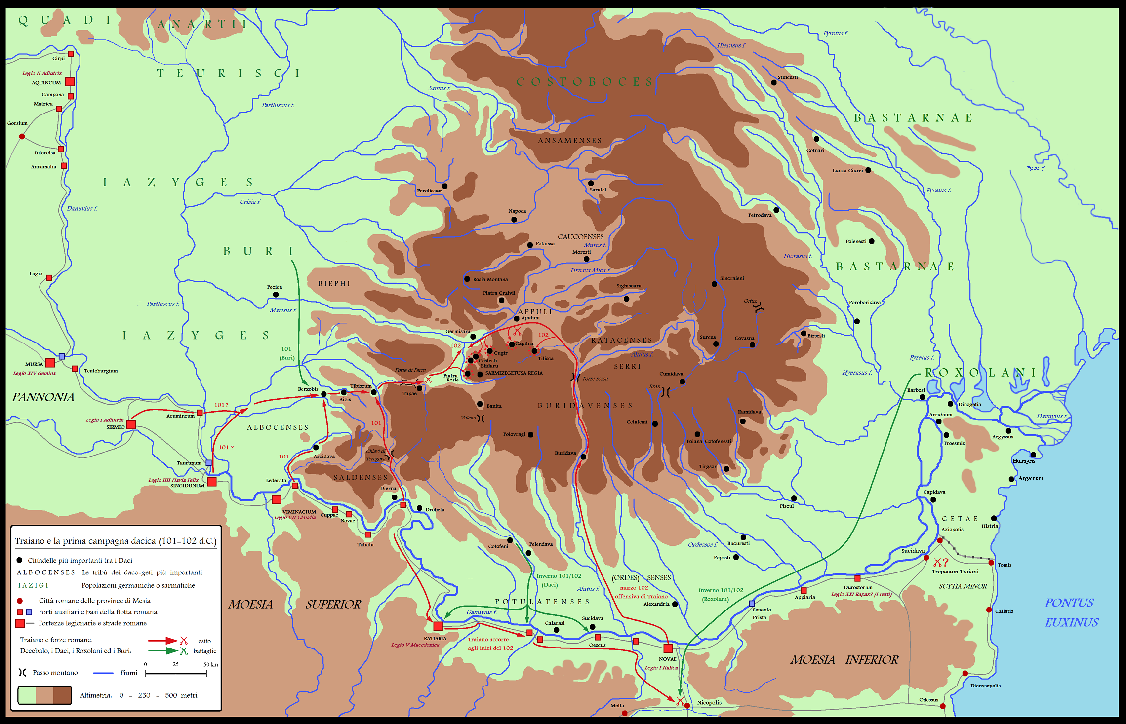 La Dacia durante la prima expeditio dacica di Traiano nel 101/102 d.C.